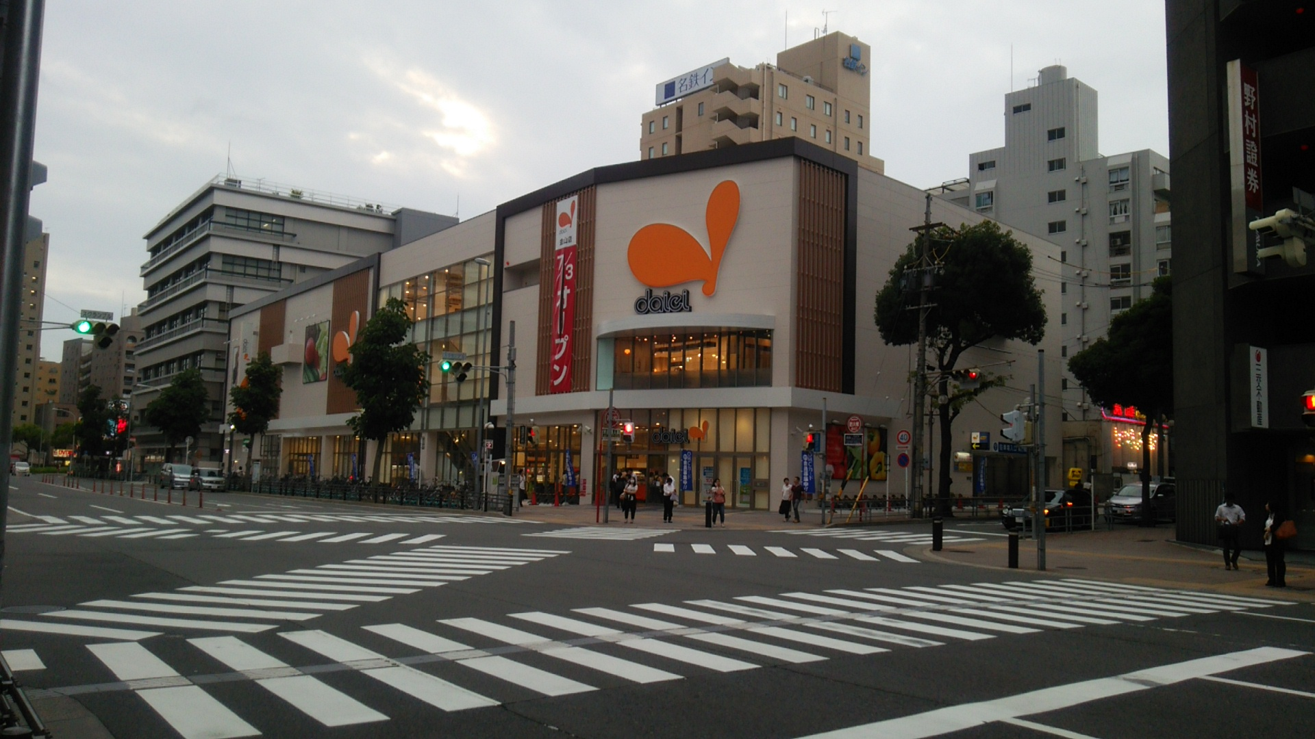 ダイエー金山店正面入り口。2014年6月27日撮影